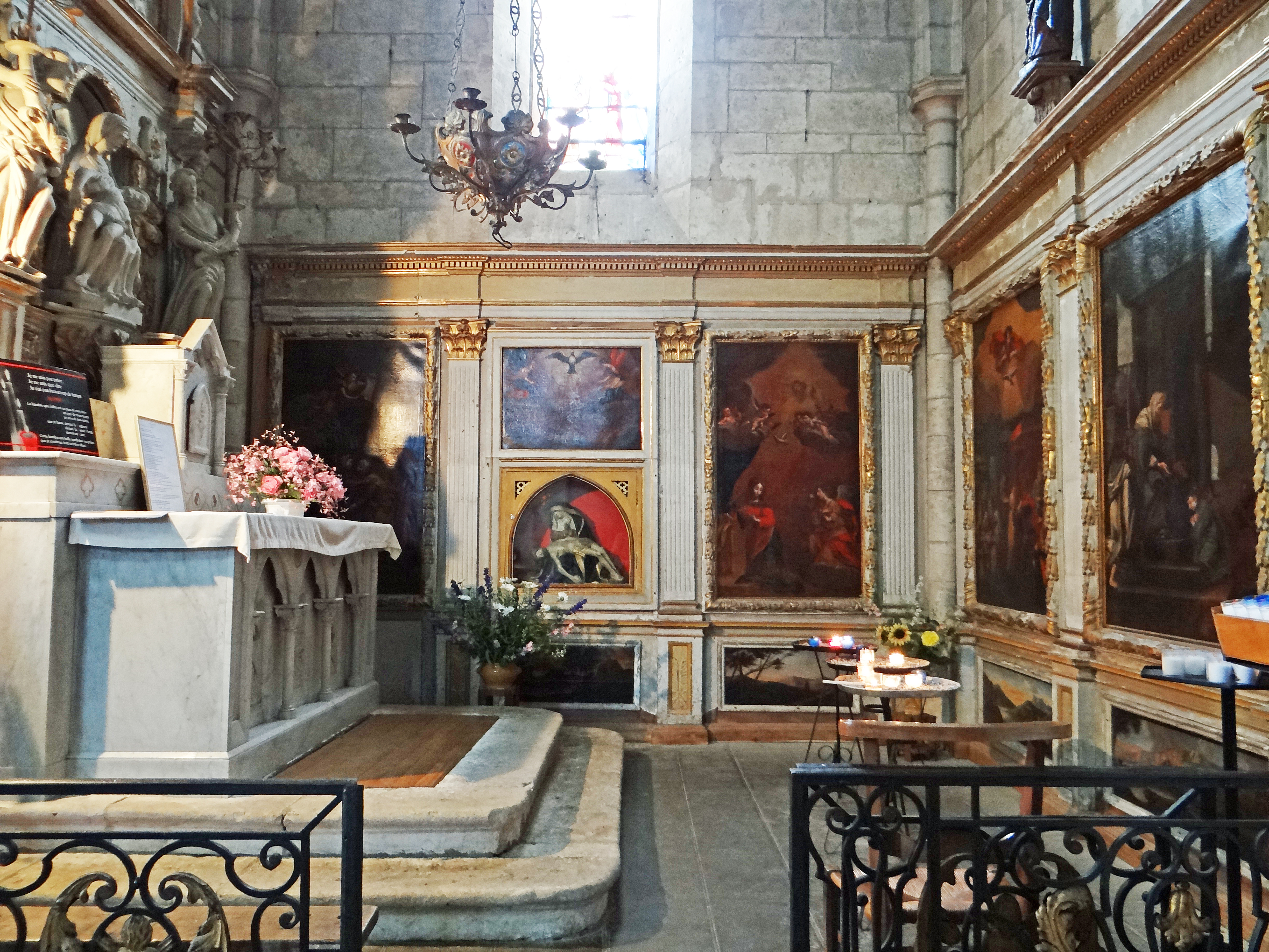 Montpezat-de-Quercy - Une chapelle latérale .